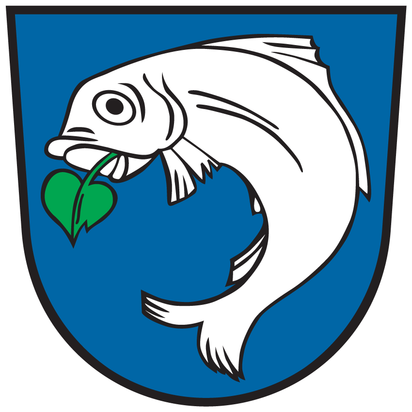 Wappen der Gemeinde Pörtschach am Wörther See, Kärnten, Österreich